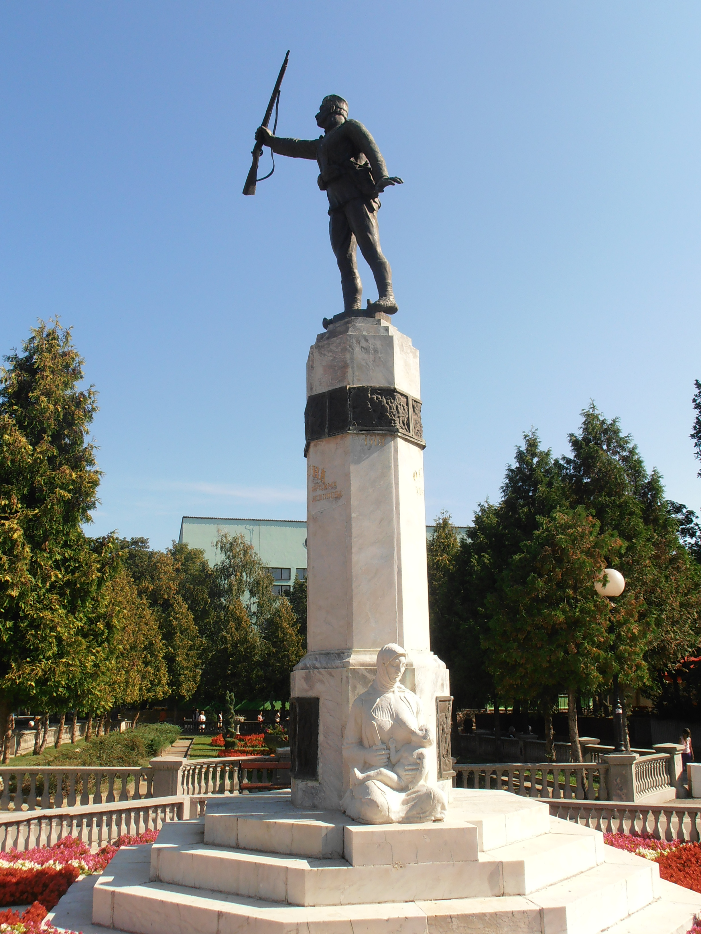 Споменик на Скверу